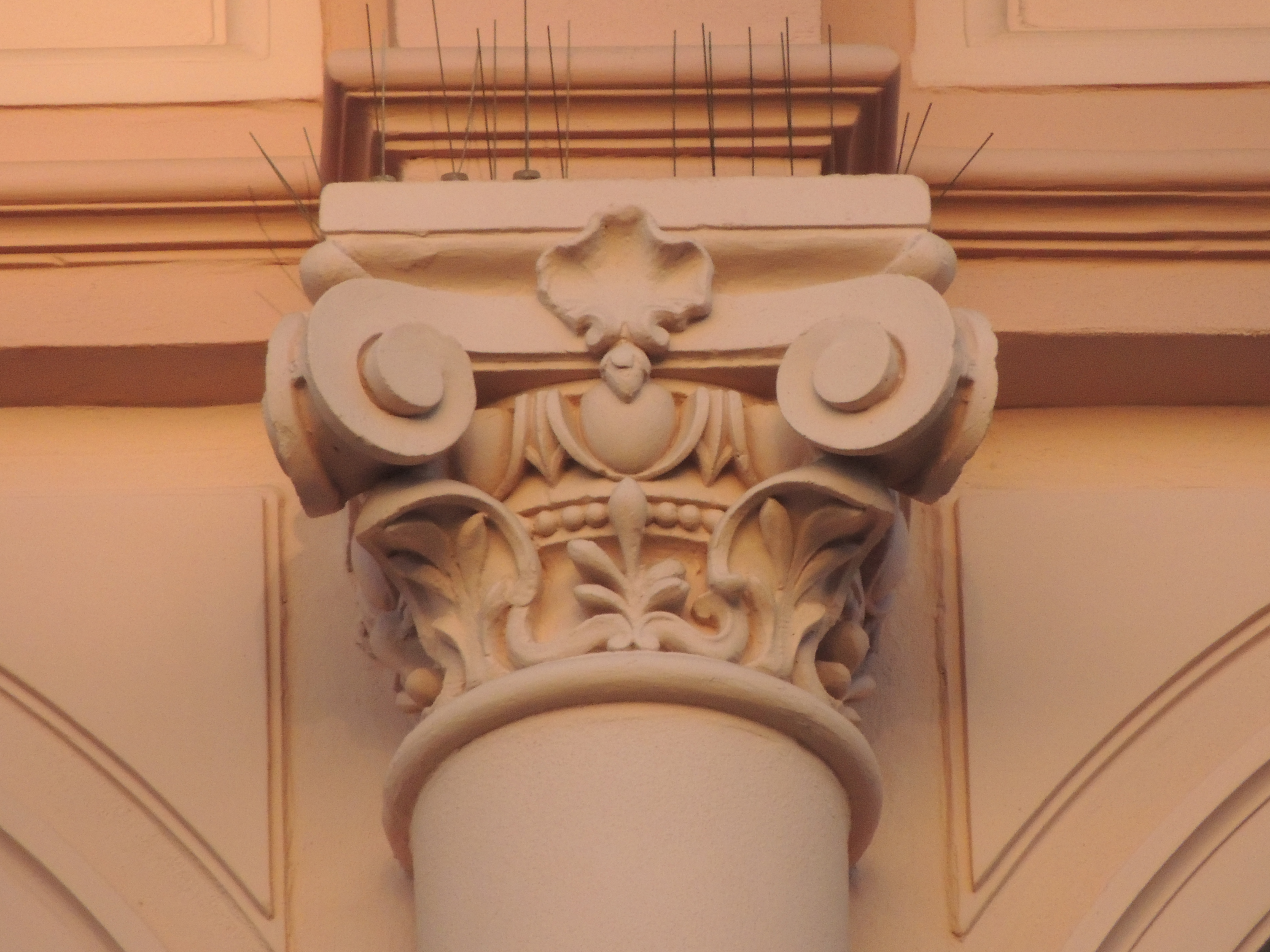 Łódź, Piotrkowska 181